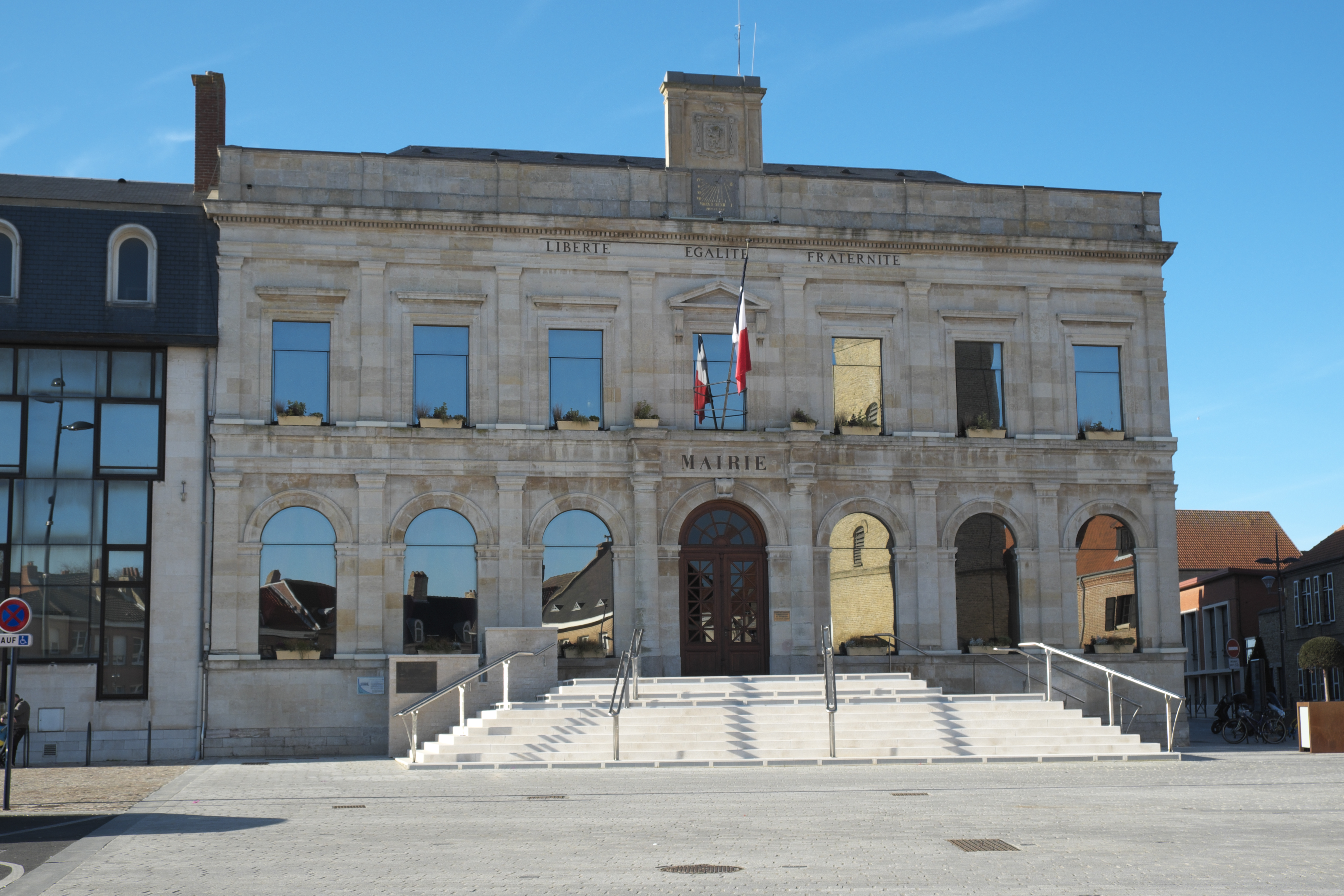 Rathaus, Hôtel de ville, in Gravelines im Département Nord (Hauts-de-France/Frankreich)